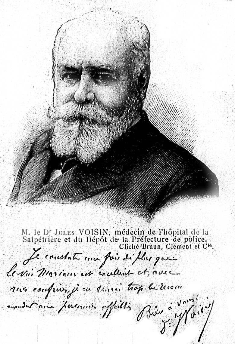 issu du fond de la bibliothèque de Reims.